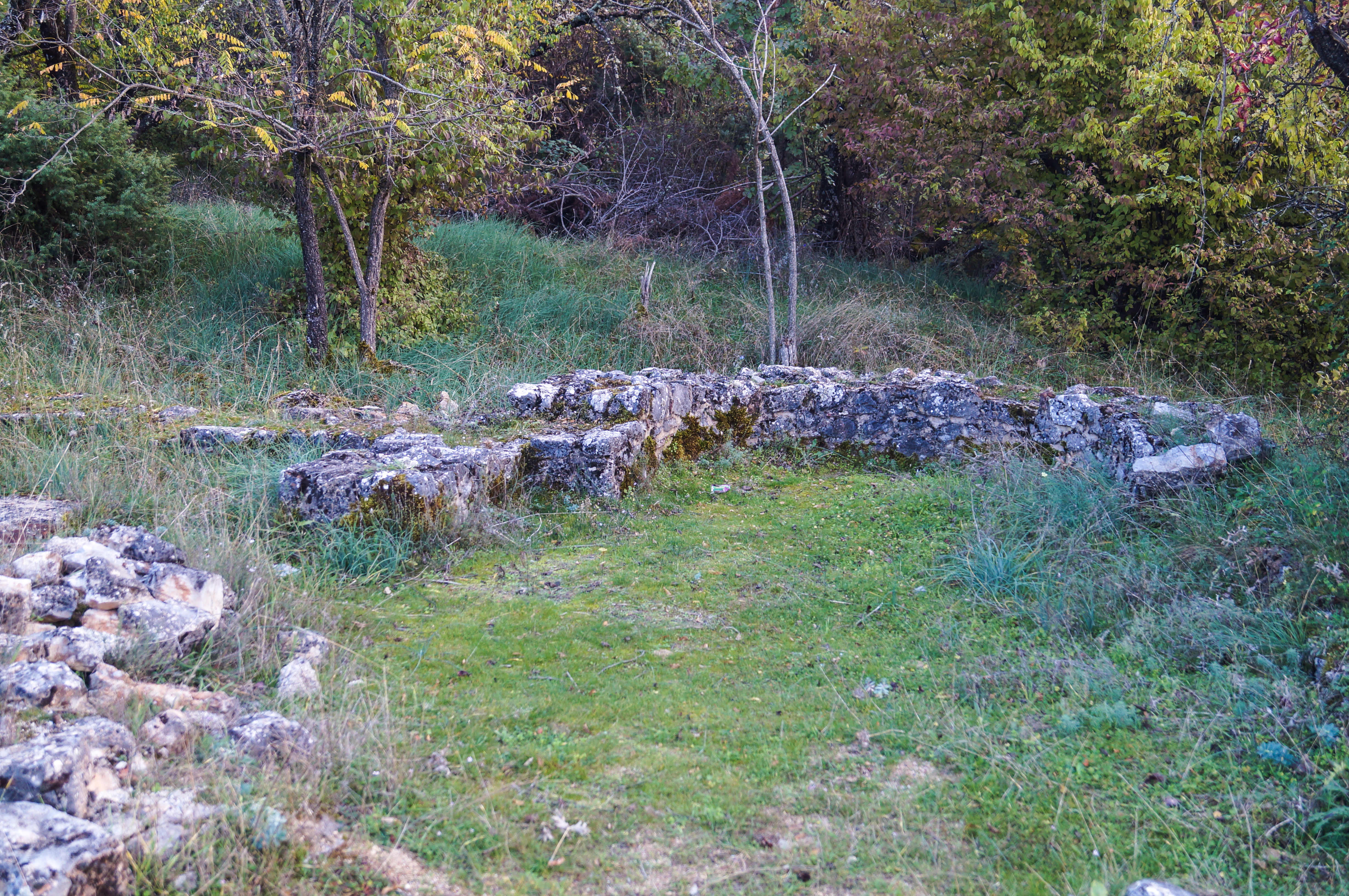 Остатоци од ранохристијанска базилика (V-Vi век) кај археолошкиот локалитет Св. Ѓорѓи, Студенчишта, Охрид.